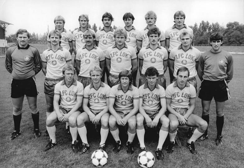 ADN-ZB-Kluge-23.8.83-zin-Leipzig: Die Mannschaft des 1. FC Lok Leipzig für die Fußball-Oberligasaison 1983-84. Vorn v.l.n.r.: Andreas Bornschein, Dieter Kühn, Wolfgang Altmann, Lutz Moldt und Frank Baum. Mitte v.l.n.r.: torhüter Siegfried Stötzner, Rainer Wallek, Hans-Jürgen Kinne, Uwe Zötzsche, Peter Schöne, Mannschaftskapitän Thomas Dennstedt und Torhüter Rene Müller. Hinten v.l.n.r.: Uwe Bredow, Ronald Kreer, Carsten Rost, Andreas Treske, Raymond Haarseim und Hans Richter. Die Elf aus der Messestadt trifft in der ersten Runde des Fußball-UEFA-Pokals am 14.9. (in Bordeaux) und 28.9 (In Leipzig) auf die europäische Spitzenmannschaft von Girondins Bordeaux.